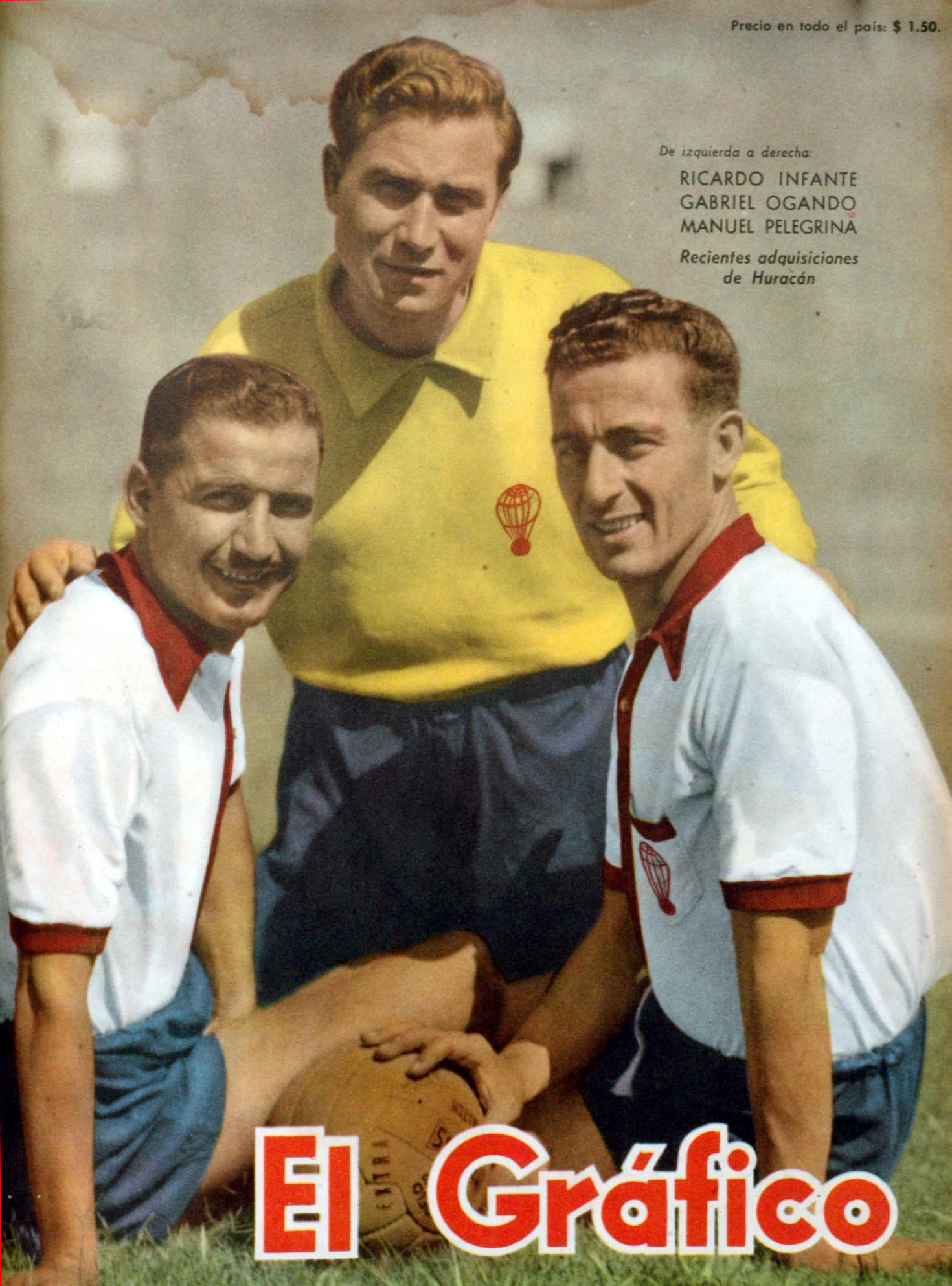 El Grafico del 27 de Marzo de 1953. Edicion 1755